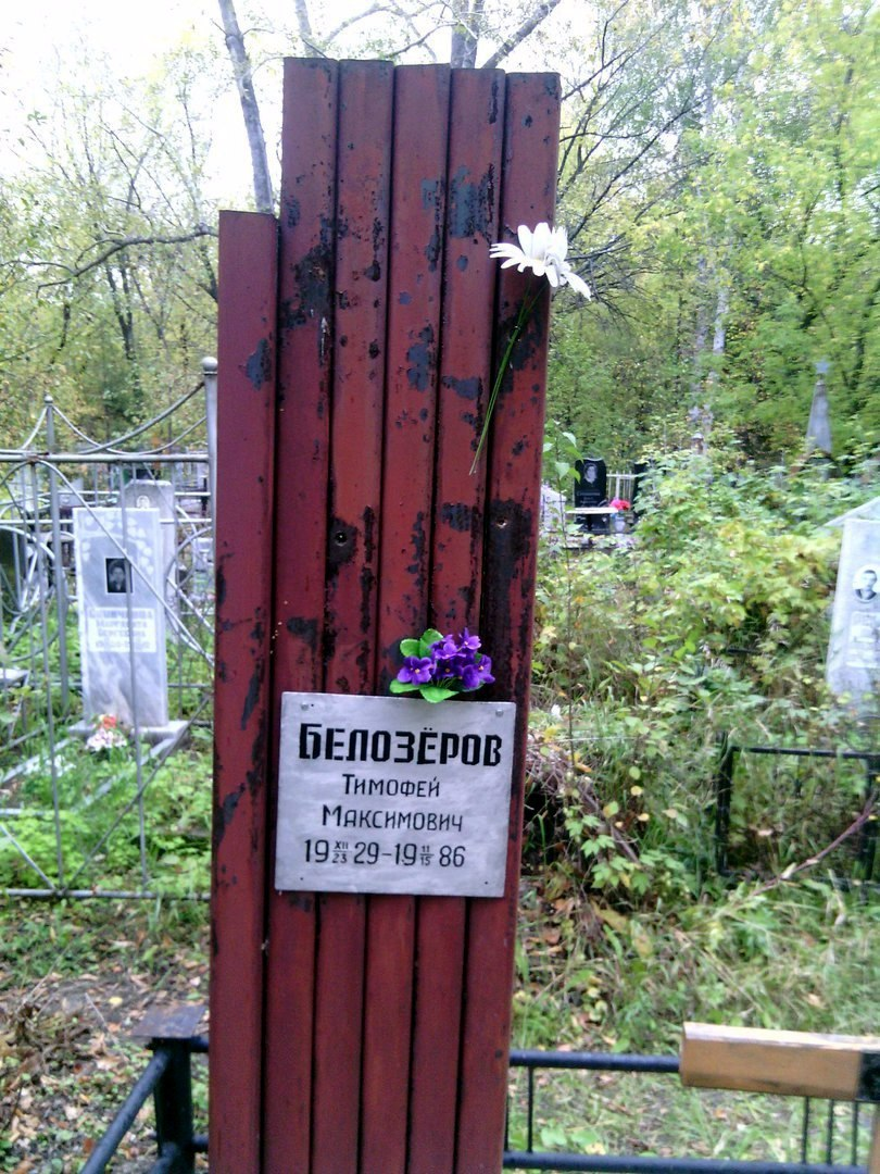 Фото могилы Тимофея Белозерова Детского писателя на Старо-Восточном кладбище